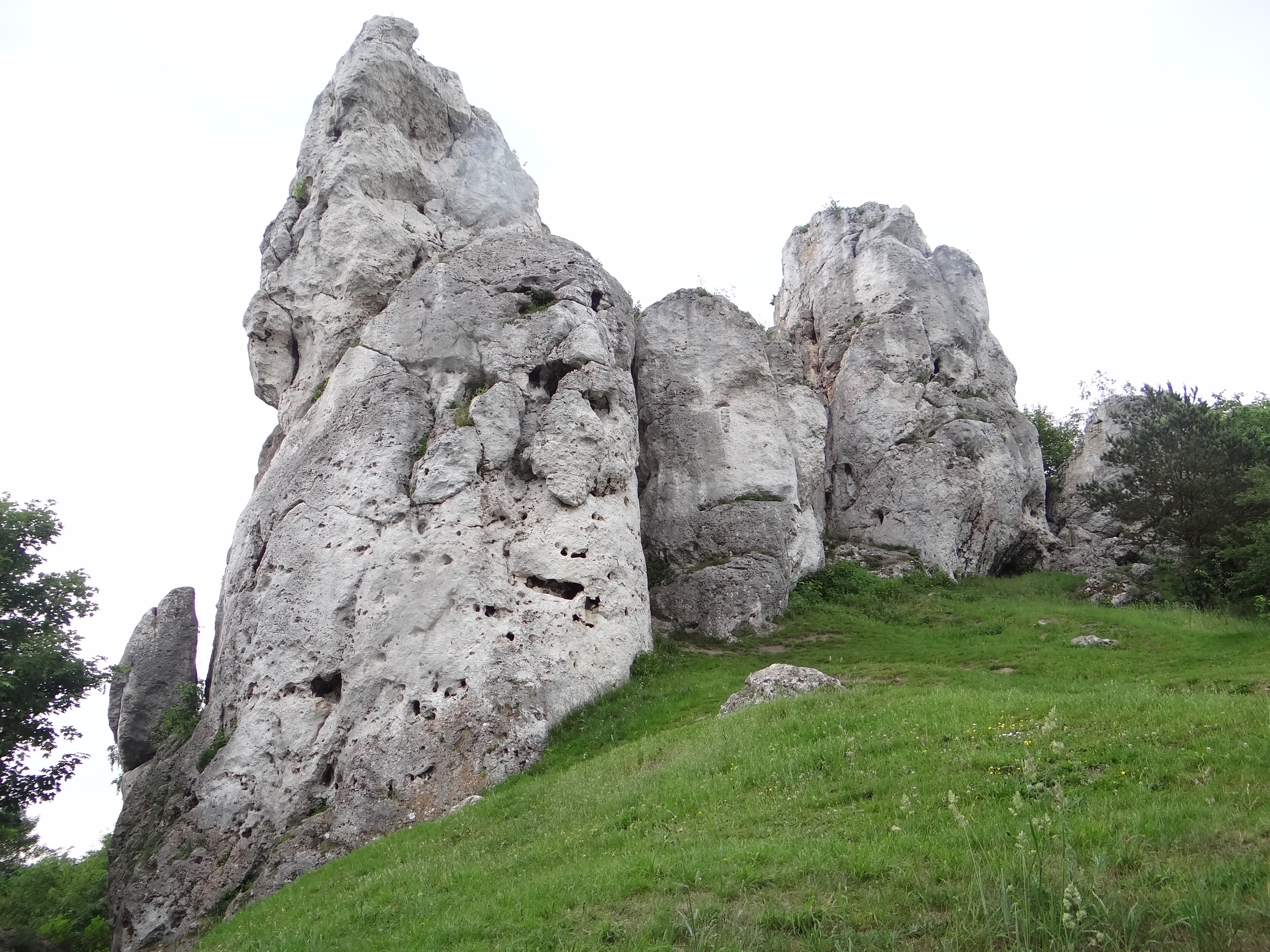 Skały Grupy Knura w Łutowcu